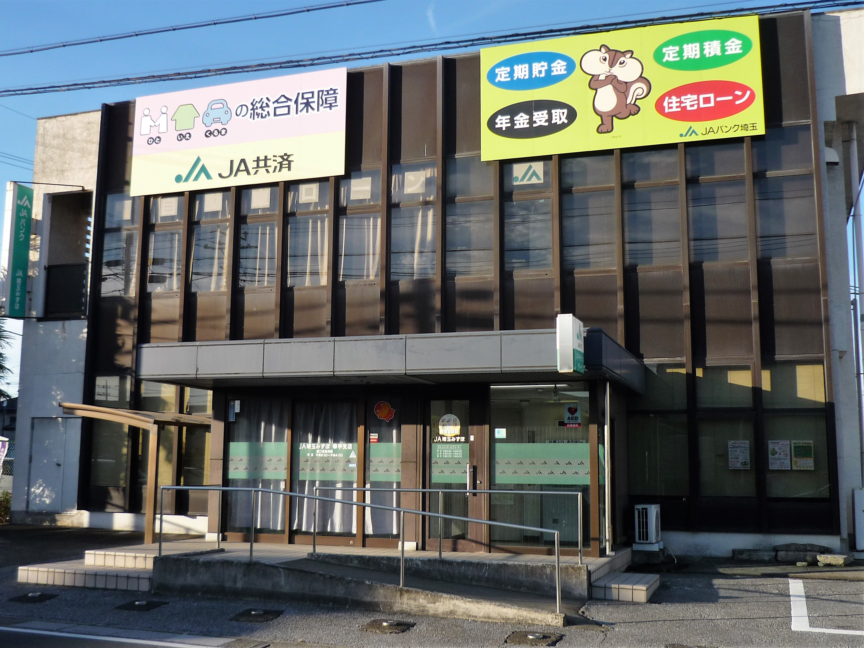 埼玉みずほ農業協同組合本店・幸手支店（幸手市東）